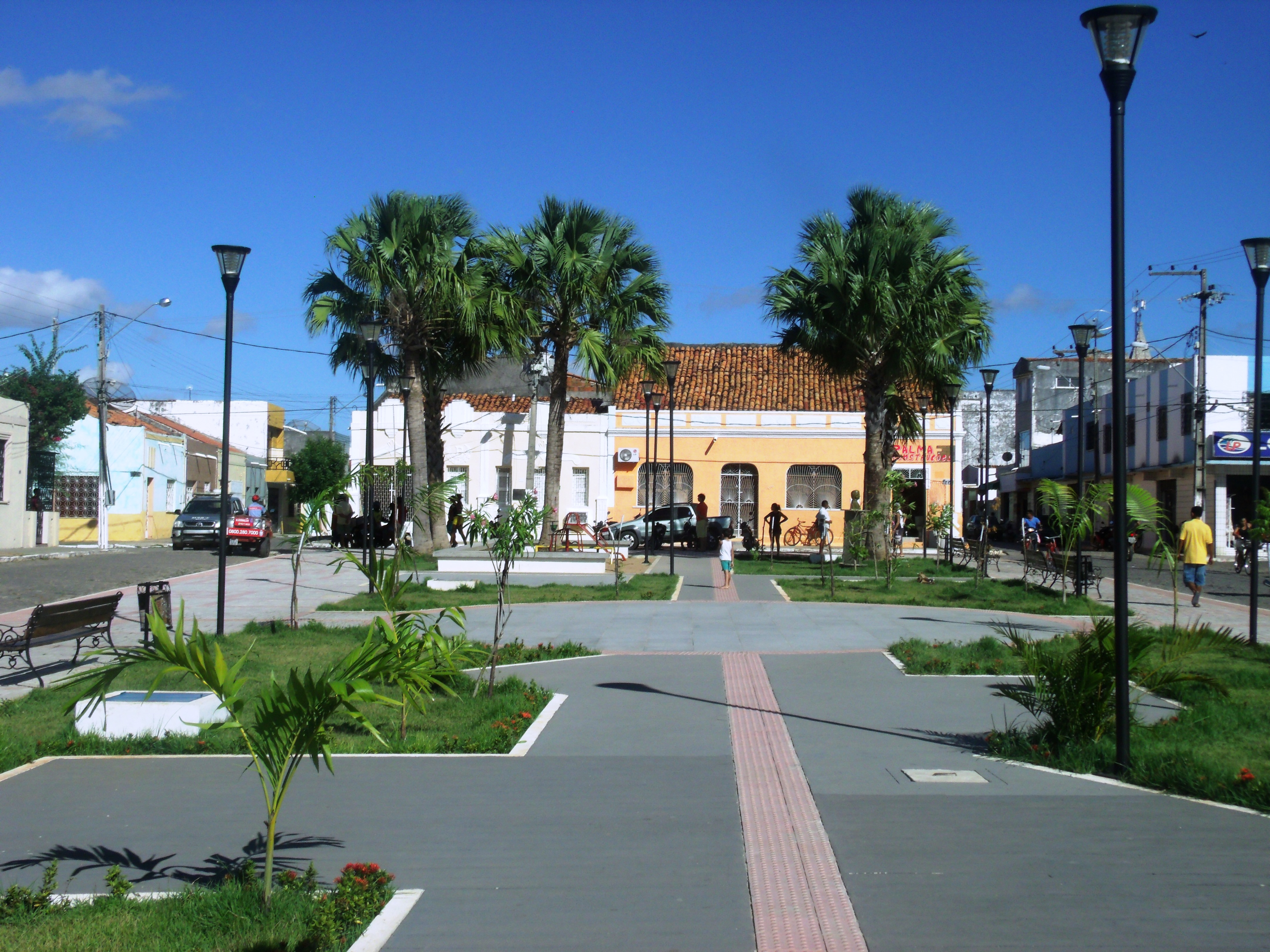 Vista parcial da praça do Mercado de Coreaú, oficialmente denominada de Praça Maria Natividade de Albuquerque.